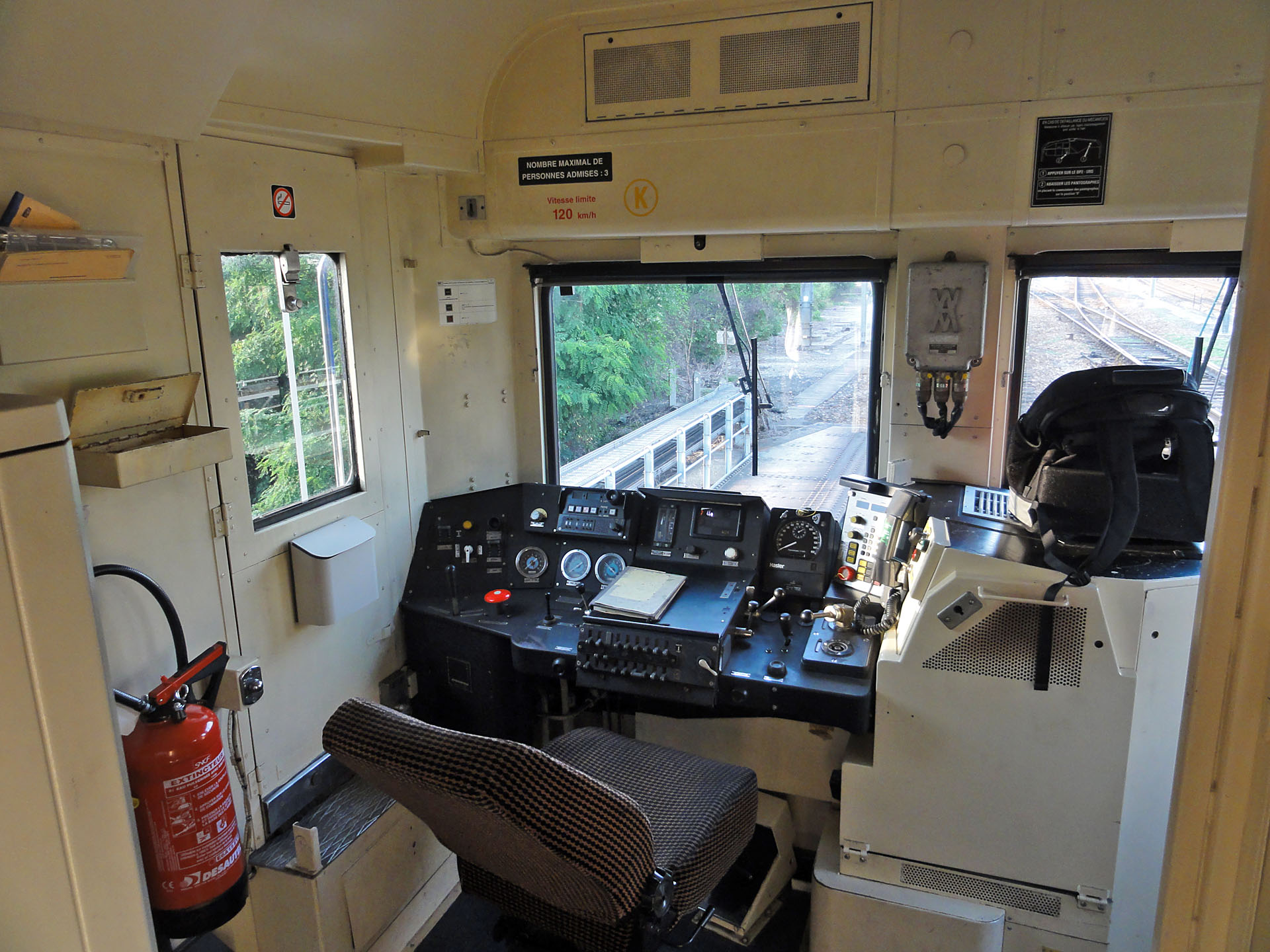 Cabine de conduite d'une rame inox de banlieue au technicentre Paris Nord-Joncherolles, Villetaneuse, Seine-Saint-Denis, France.